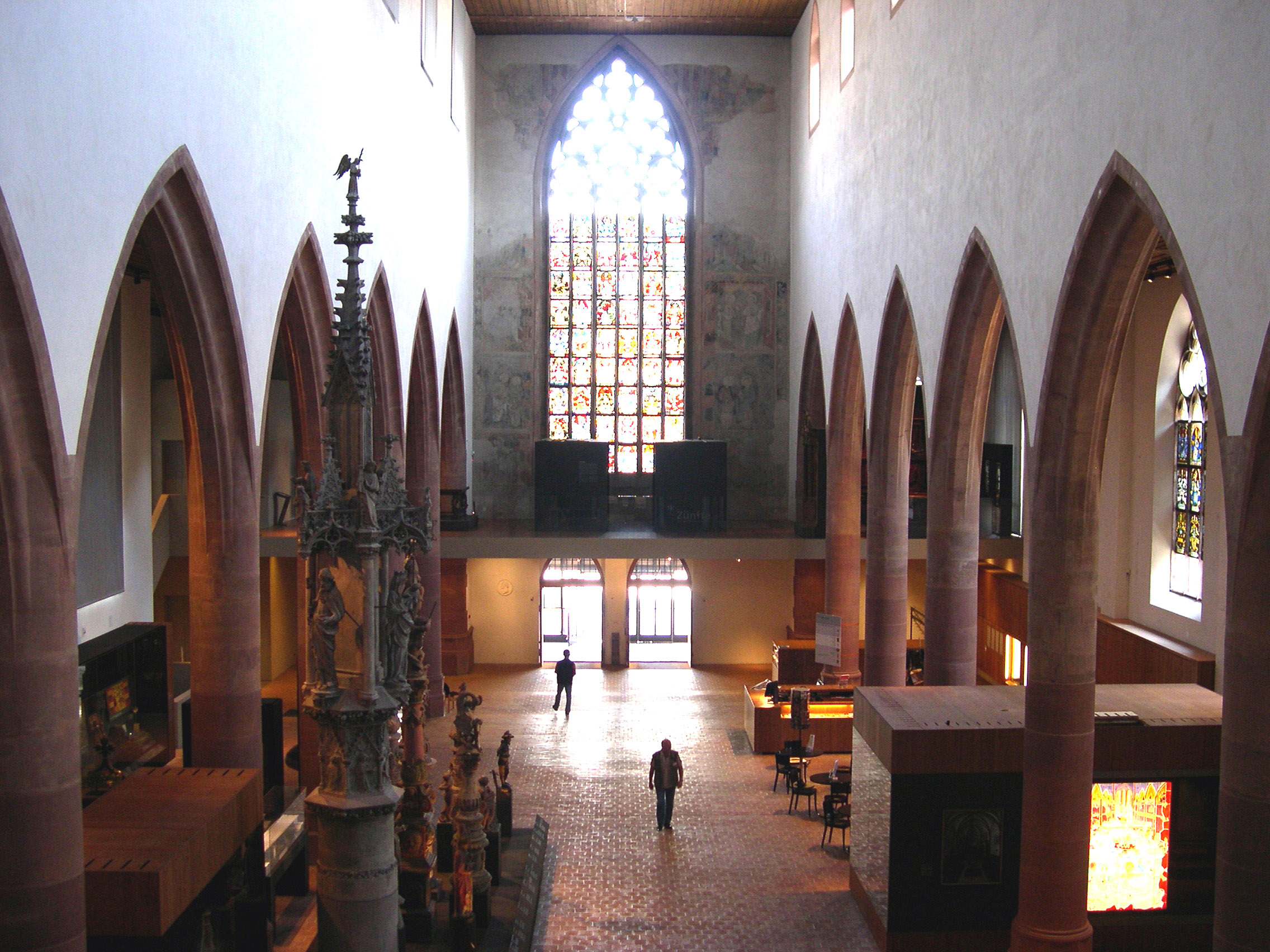 Historisches Museum Basel in der Barfüsserkirche. Blick von der Chorempore in Richtung Eingang, links historische Brunnenstöcke, rechts Museumsshop und Kasse sowie Cafeteria.